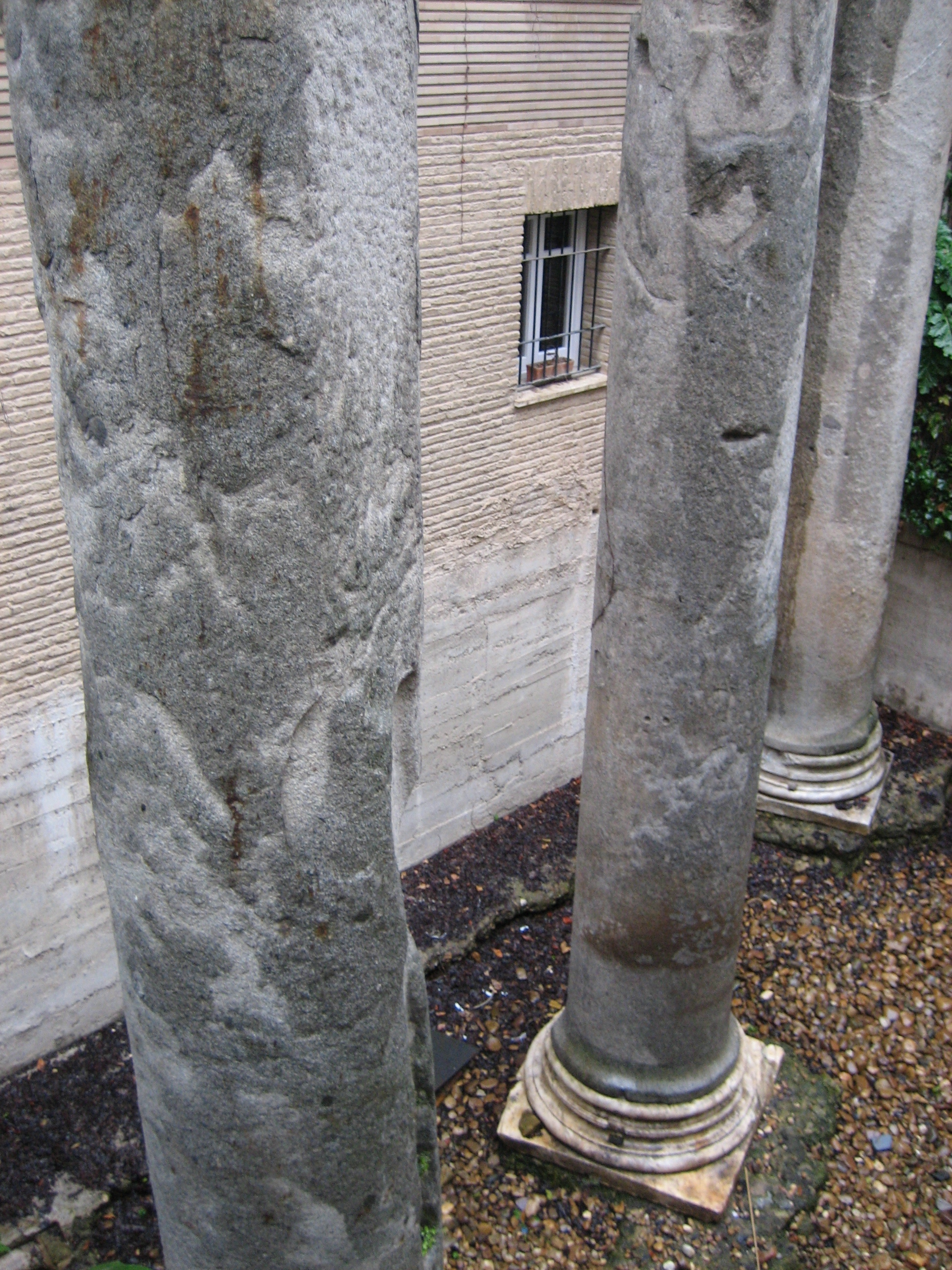 Templo romano de Marte, Sevilla, calle Mármoles.